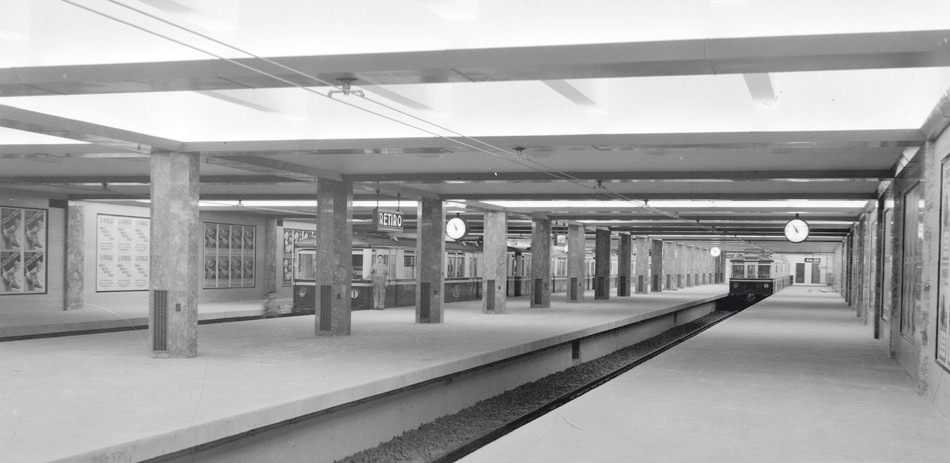 Vista general de la estación Retiro de la línea C de la red de subterráneos de Buenos Aires durante la administración de la Corporación de Transportes de la Ciudad de Buenos Aires (CTCBA).